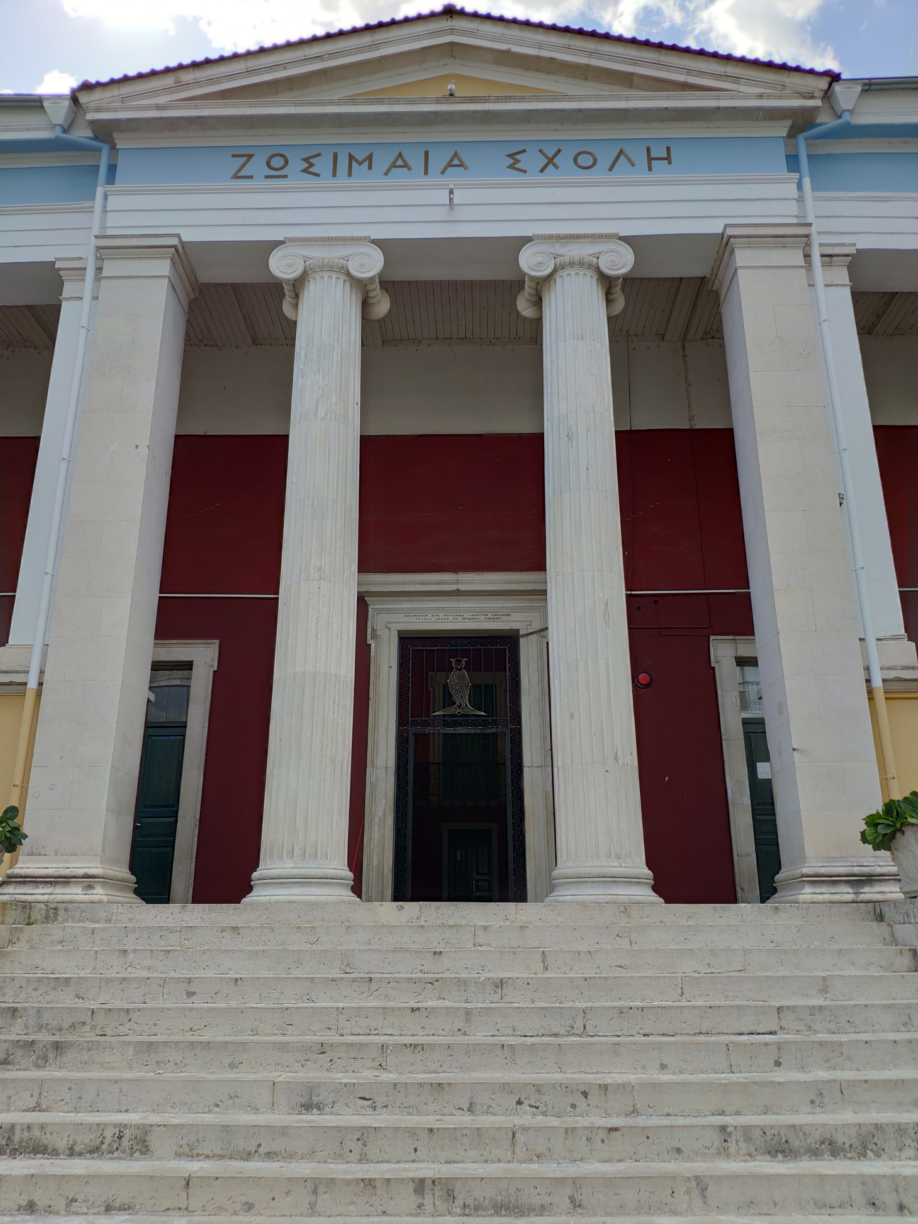 Ζωσιμαία Σχολή Ιωαννίνων«Ζωσιμαία Σχολή»